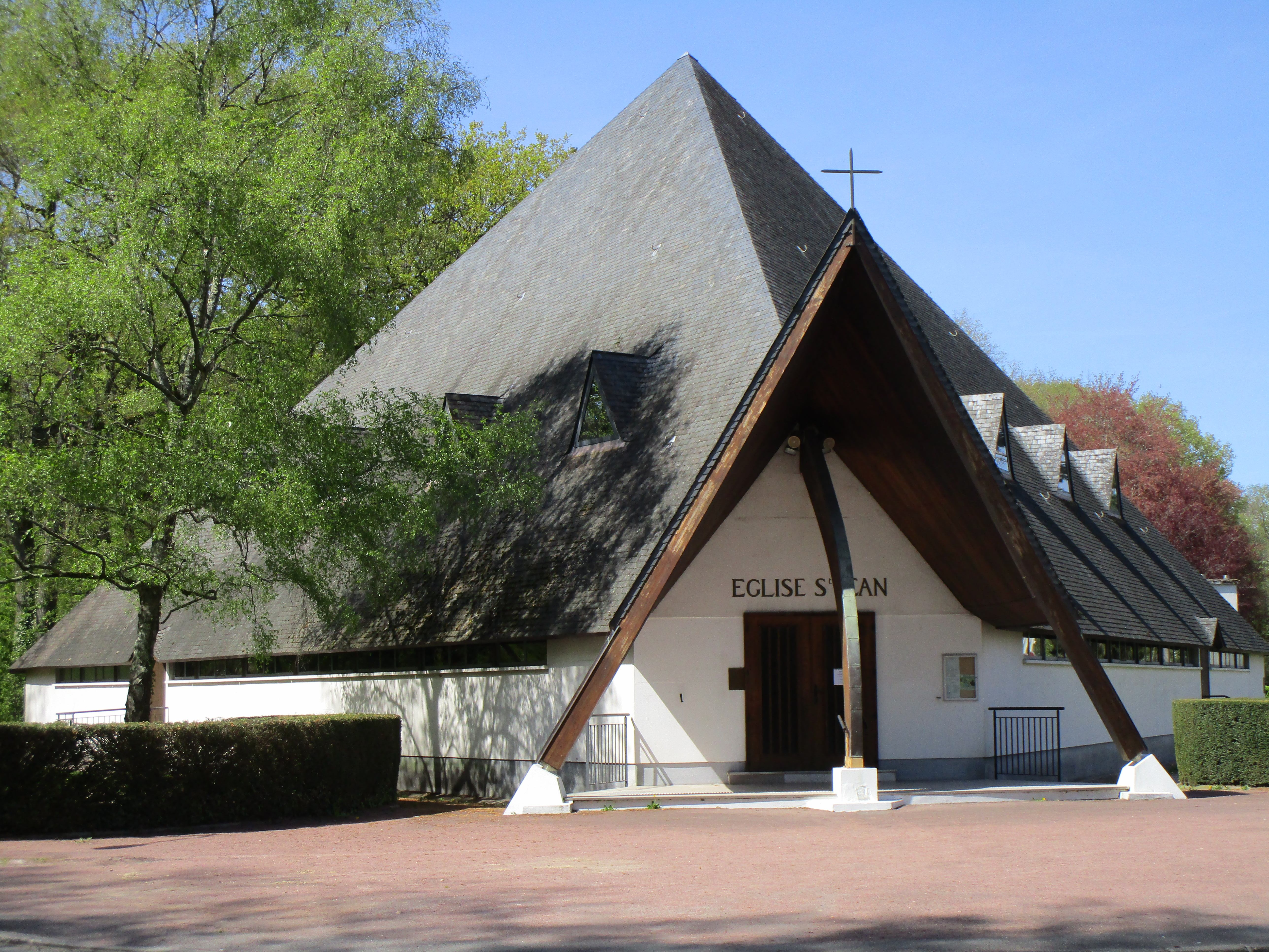 L'église Saint-Jean de Tours, quartier Montjoyeux